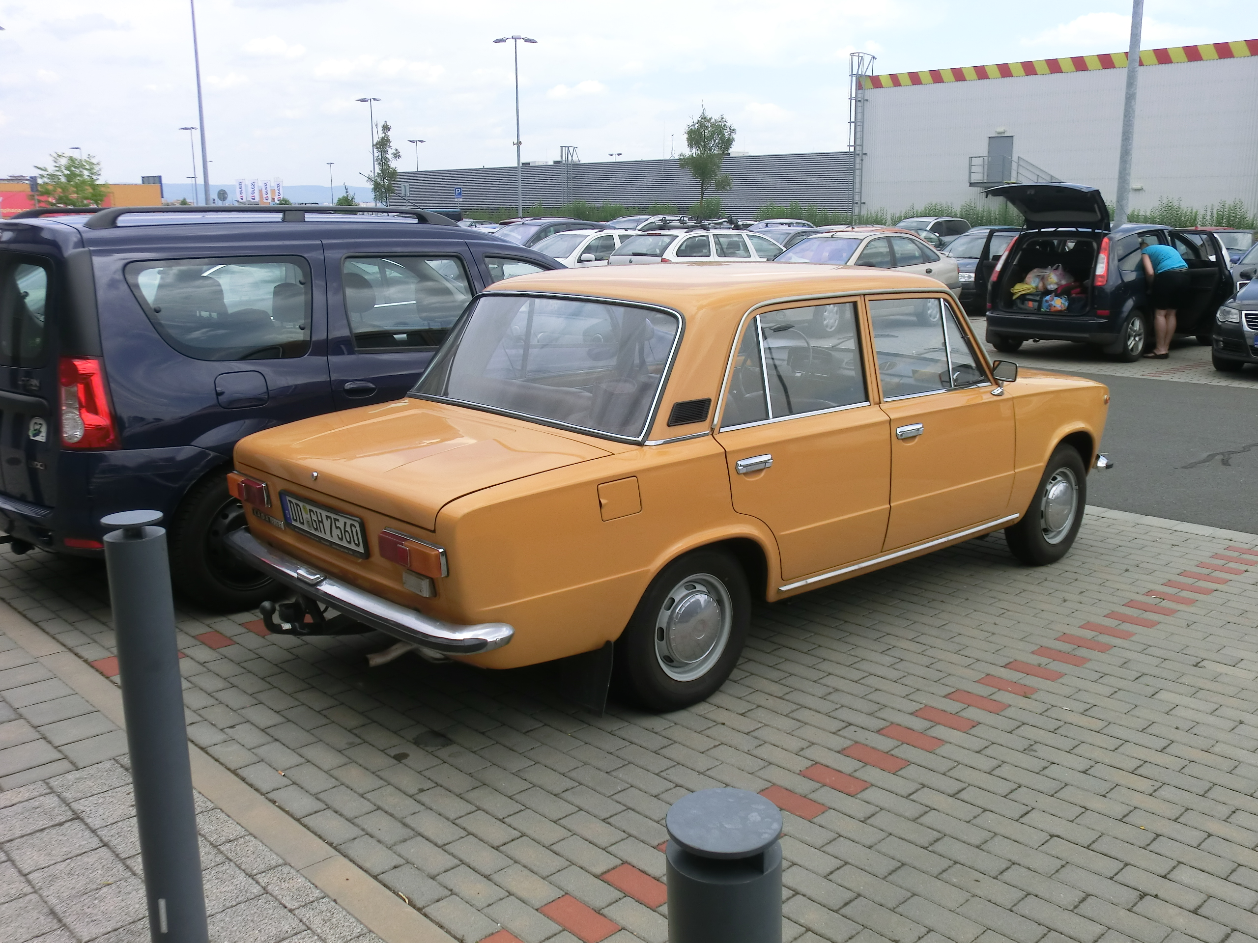 VAZ 2101 / Lada 1200s v Olomouci u aquaparku.